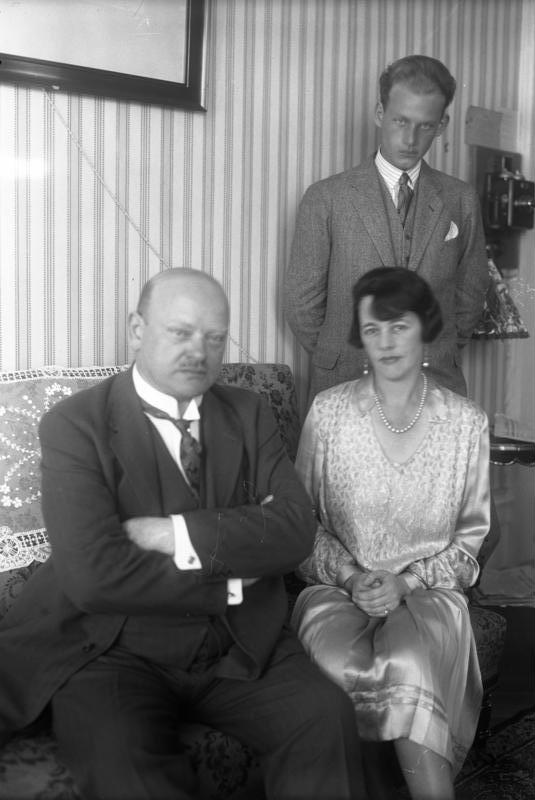 Zum Nachklang des Eintritts Deutschlands in den Völkerbund ! (Bisher zum ersten male gestattete Aufnahme) Aussenminister Dr. Stresemann mit seiner Gattin und seinem Sohn Wolfgang im Zimmer des Hotels "Metropol"